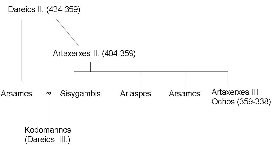 Abstammung von Dareios III. nach den Angaben in Droysen